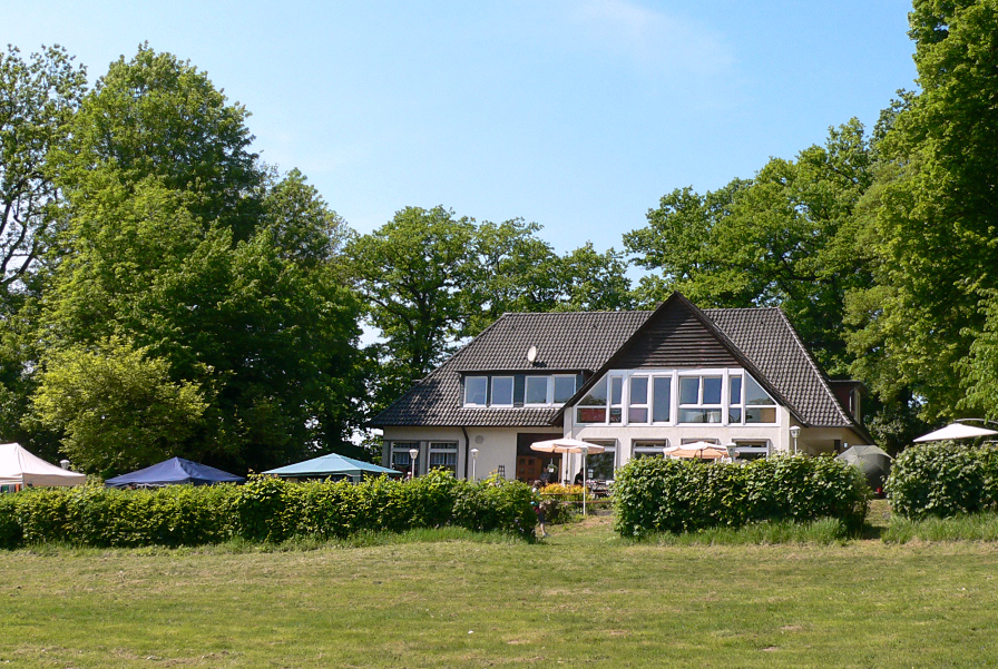 Ausflugscafe´mit Yoga im Ohrbergpark